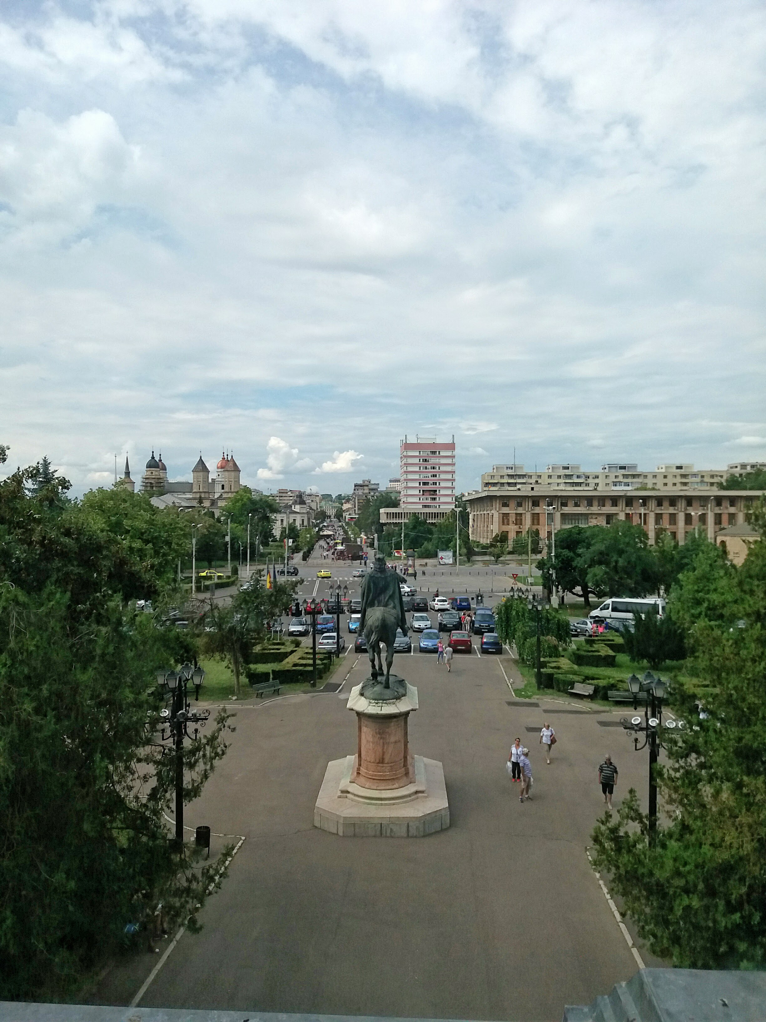 Centrul istoric și Curtea Domnească